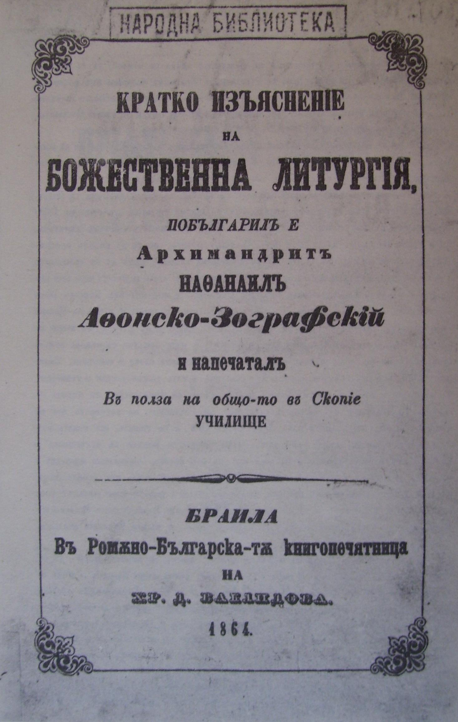 Заглавна страница на "Кратко изяснение на Божествената литургия" на Натанаил Охридски